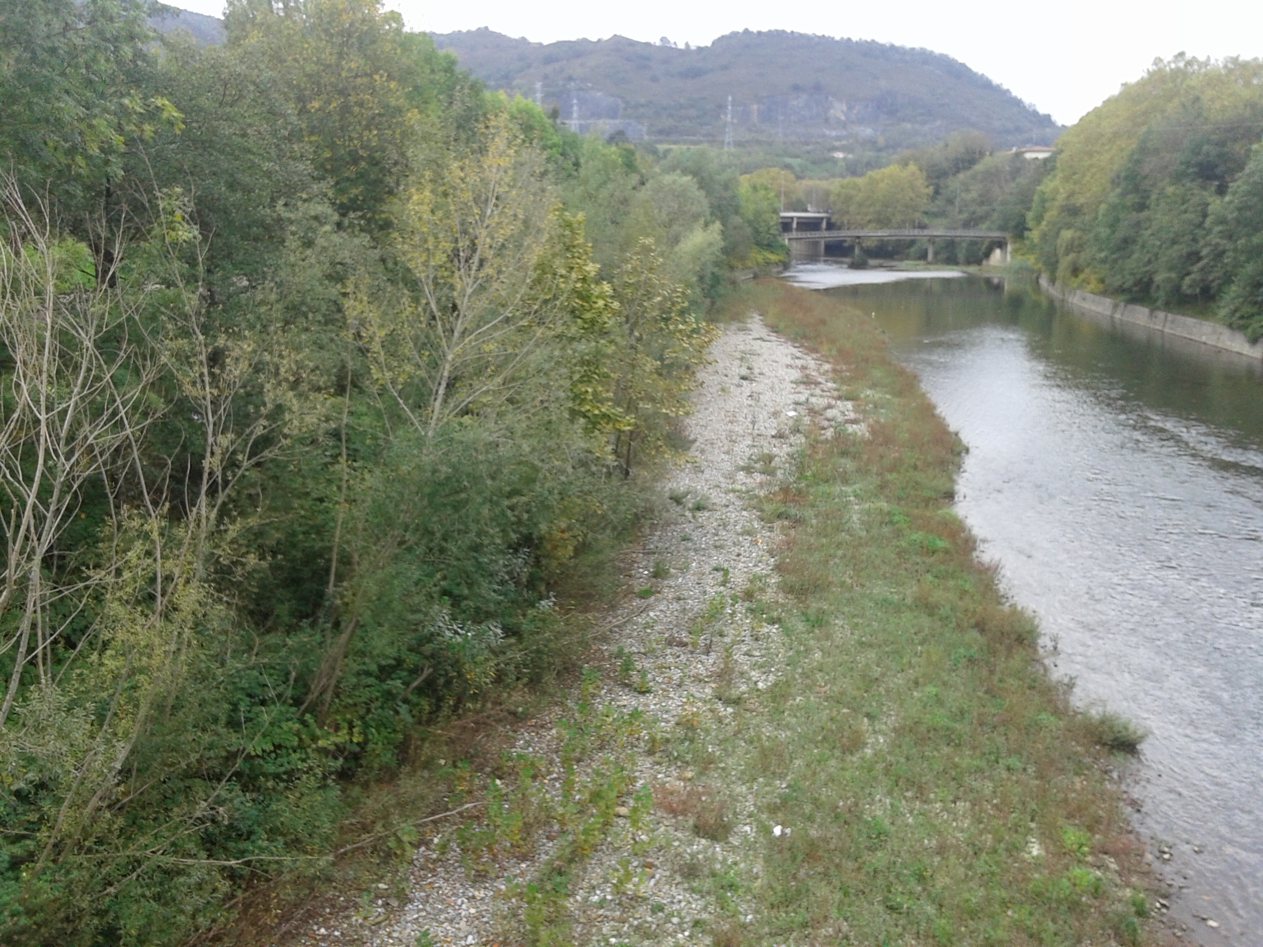 Oria ibaia Andoainetik igarotzen. Begetazioa.